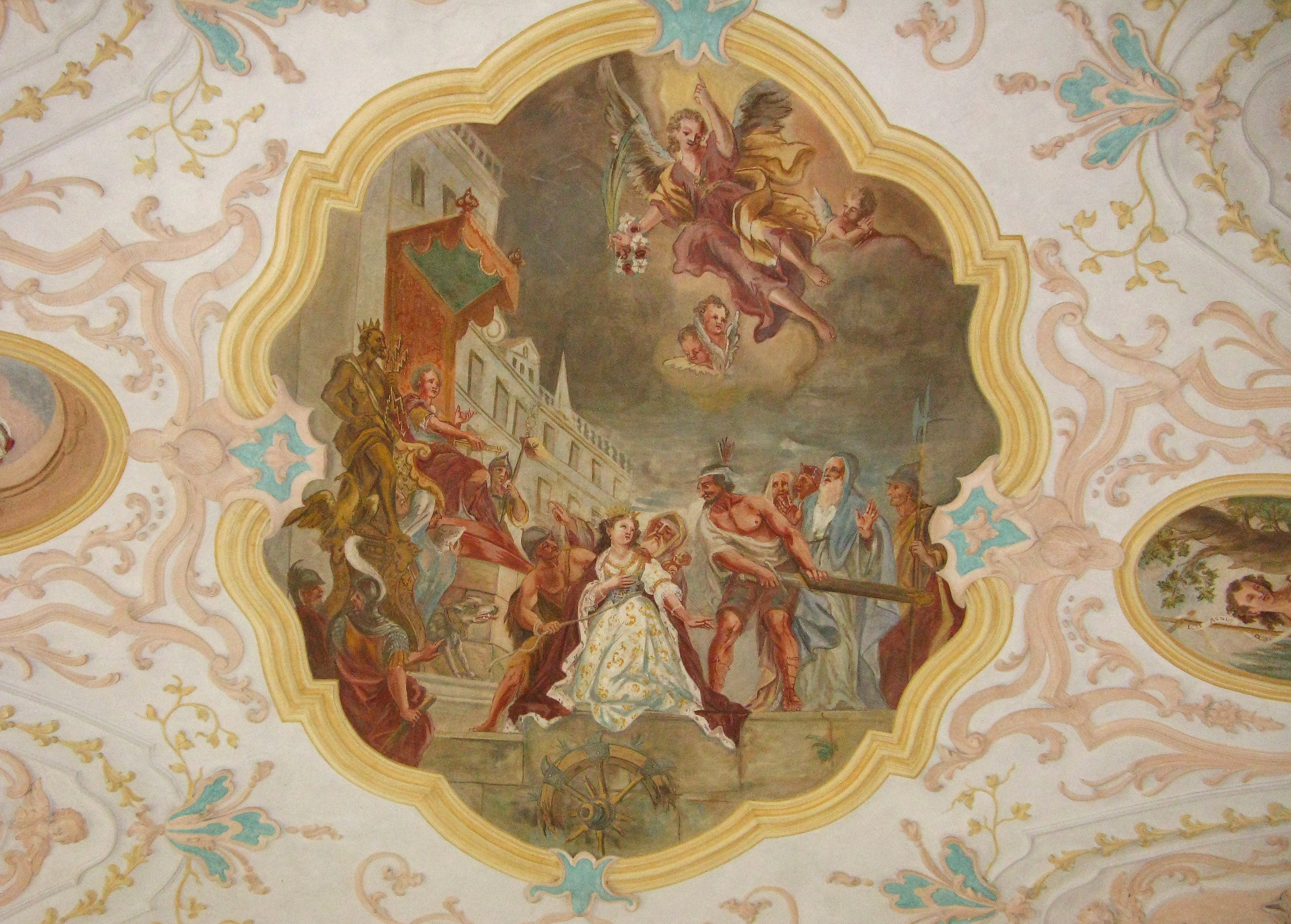 St.Katharina (Garching), Deckenfresko im Langhaus, um 1736, Martyrium der hl. Katharina